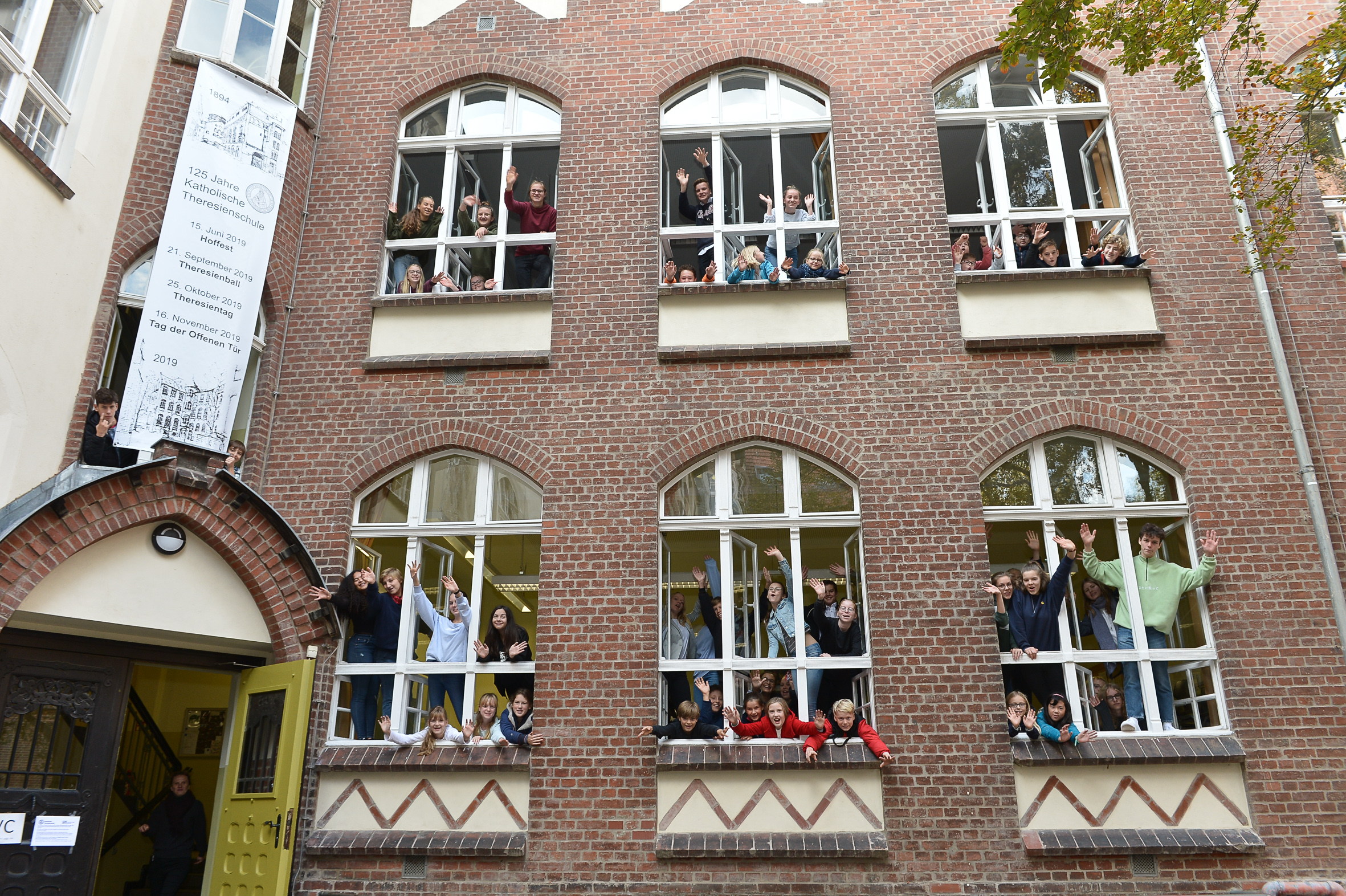 Hauptgebäude mit Schülern